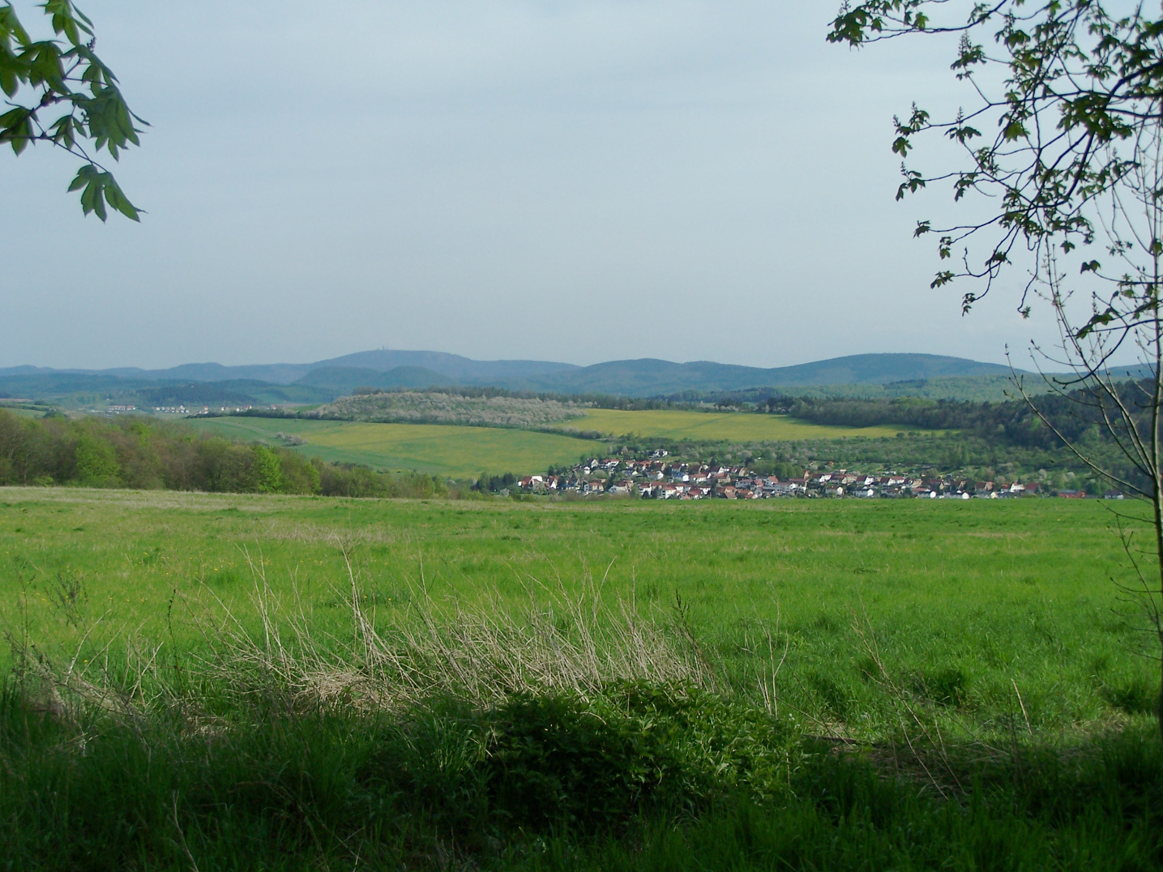 Eisenach, Thüringer-Wald-Panorama vom Dürrer Hof